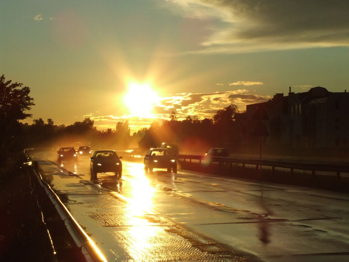 Droga krajowa nr 7 in Łomianki, Poland